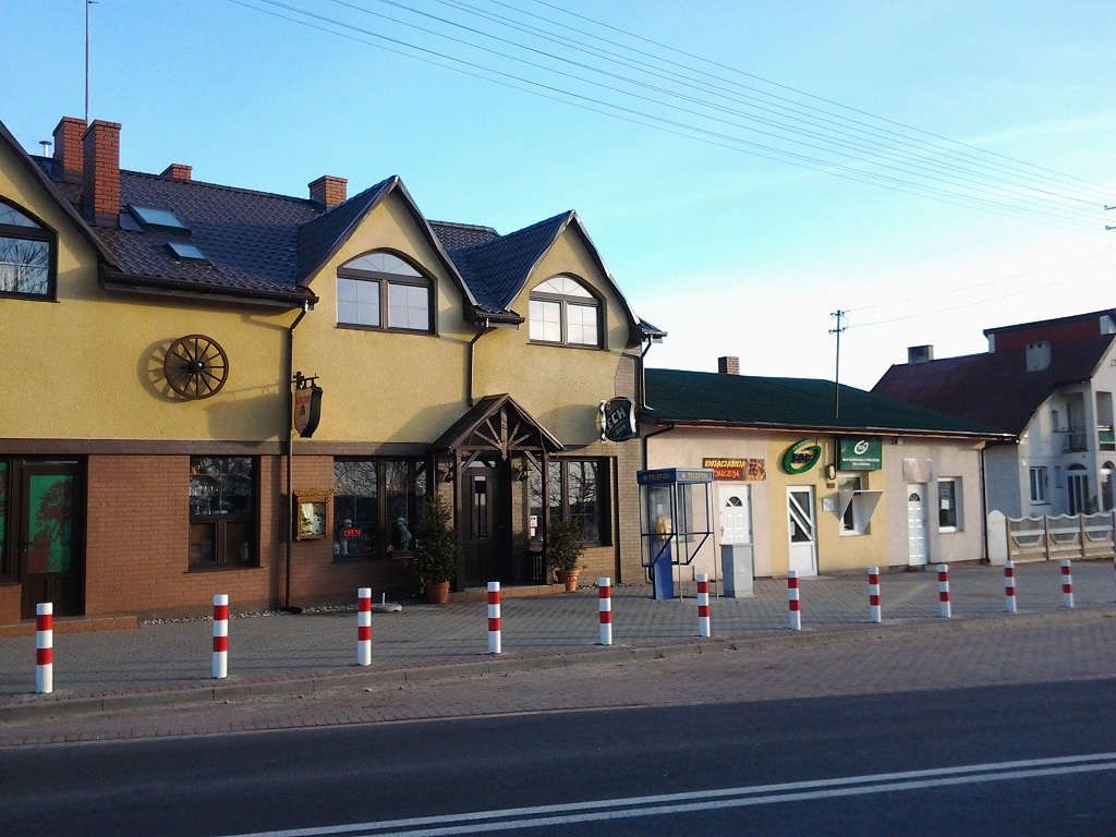 Brdów - centrum osady.